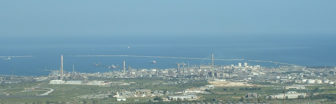 Polo peltrochimico di Augusta, visto da Melilli (SR)